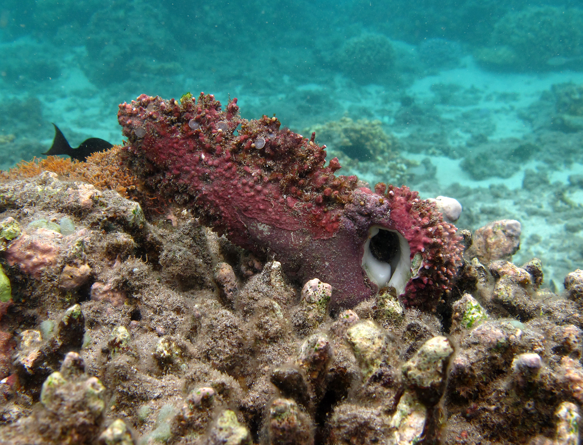 Un gastéropode Cerithium nodulosum (15 cm) à la Réunion.